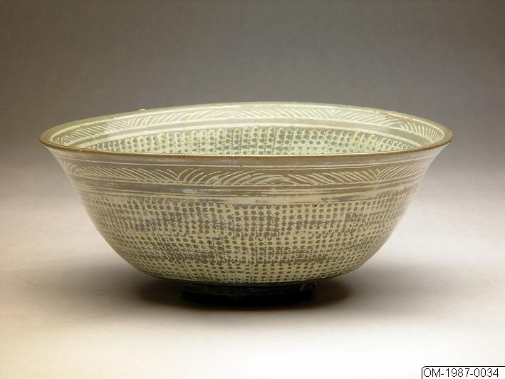 Skål i stengods med inhwa-dekorering på insidan och utsidan.